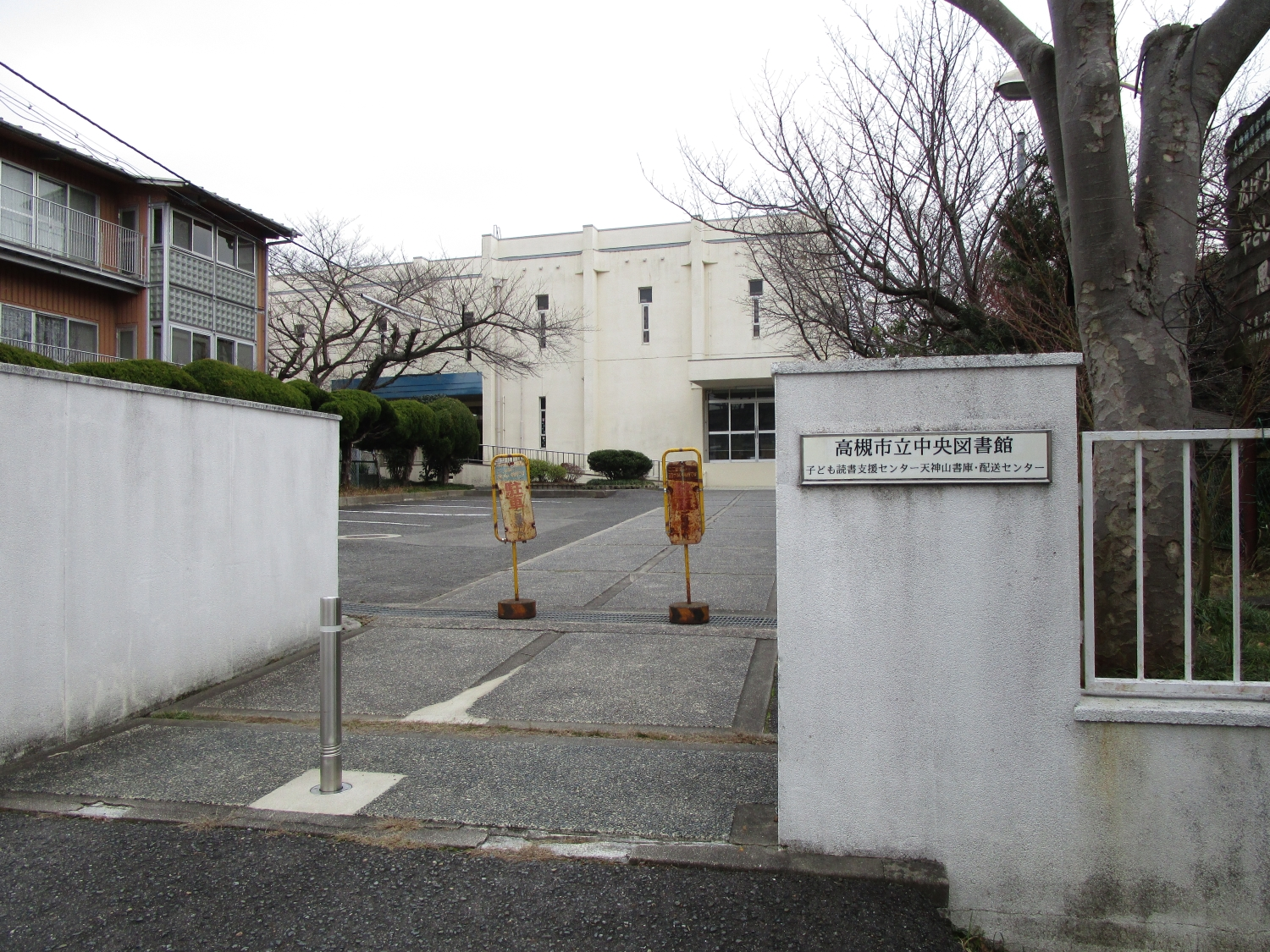 高槻市子ども読書支援センター天神山書庫・配送センター（旧高槻市立天神山図書館）